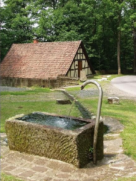 Historische Landauer Wasserkunst von 1535